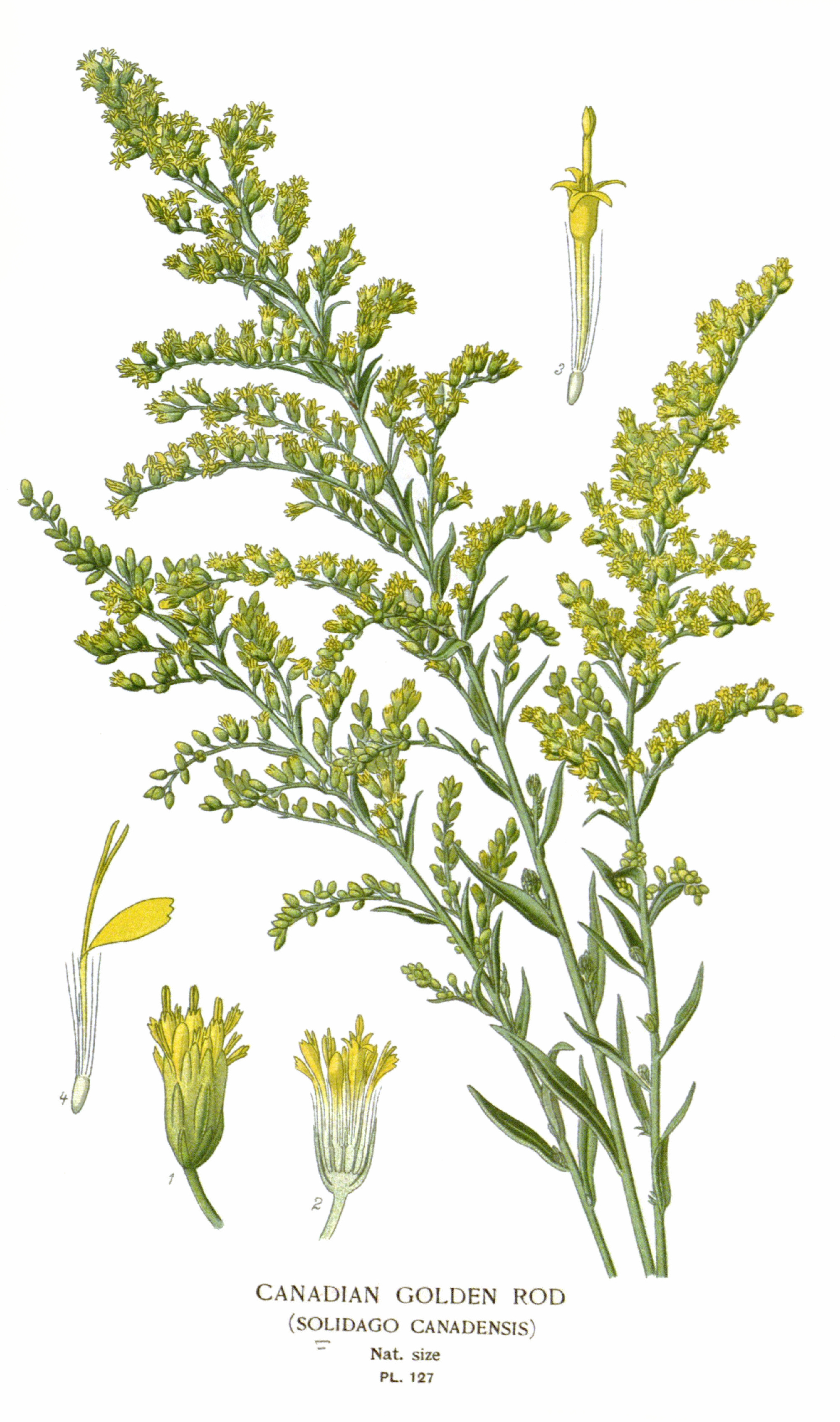 Legende: Oberer Teil der Pflanze. 1 Körbchen. 2 Körbchen, Längsschnitt. 3 Röhrenblüte. 4 Strahlenblüte. (1-4 vergr.).